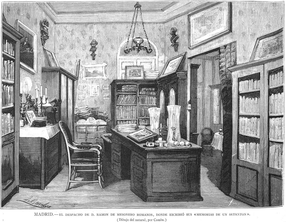 Despacho de Ramón de Mesonero Romanos en Madrid, donde escribió Memorias de un setentón, dibujo de Juan Comba, grabado publicado en la revista española La Ilustración Española y Americana.